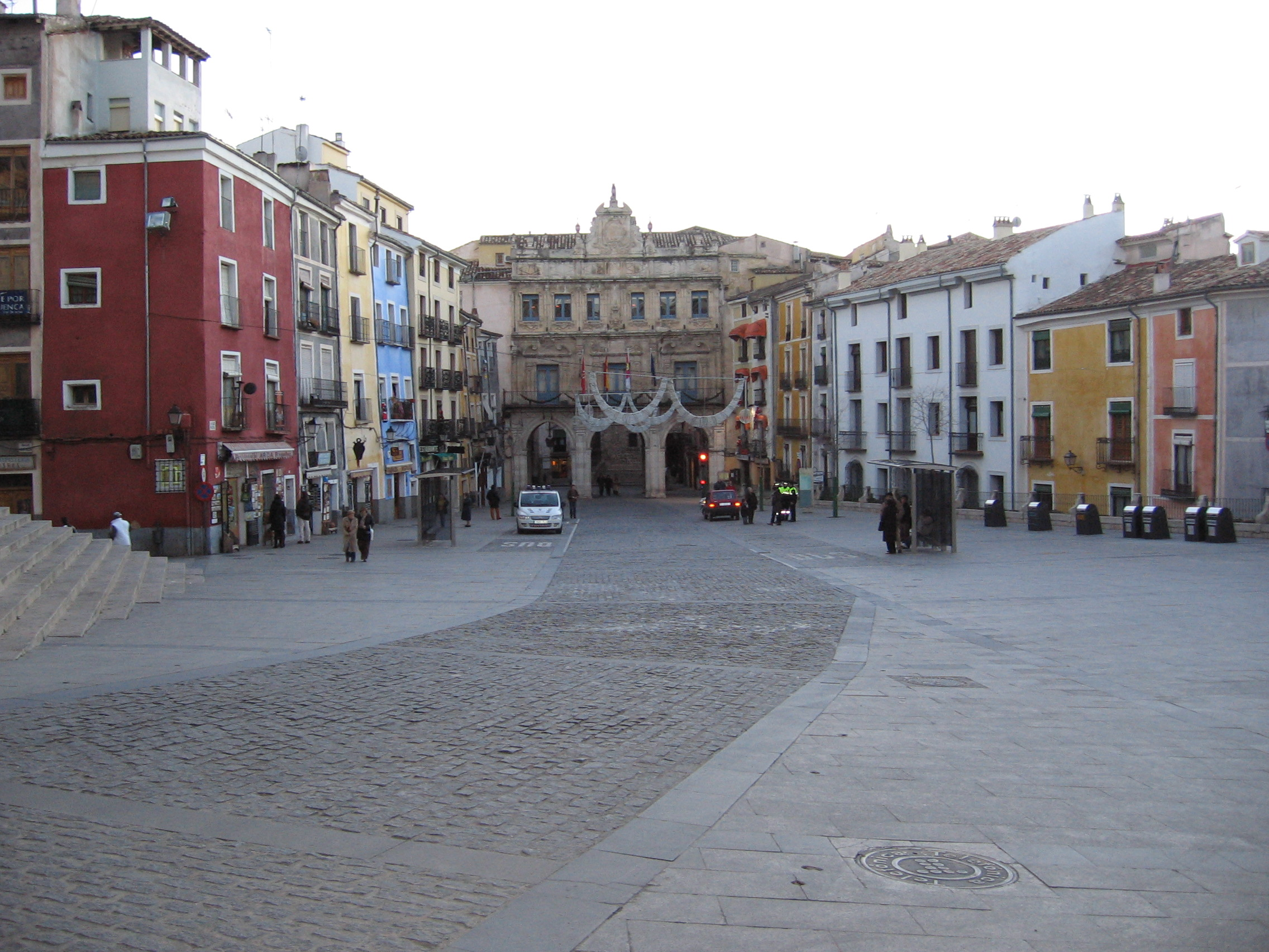 Plaza Mayor, Cuenca, Spain